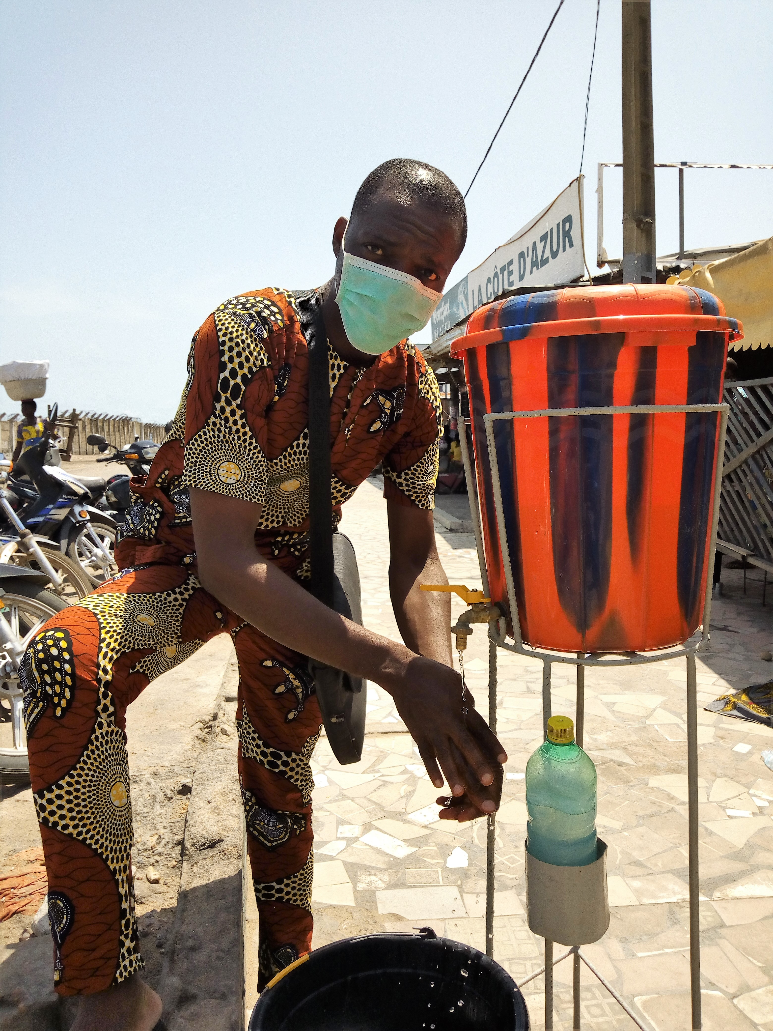 Dispositif de lavage des mains contre la propagation de la pandémie COVID19 au Bénin